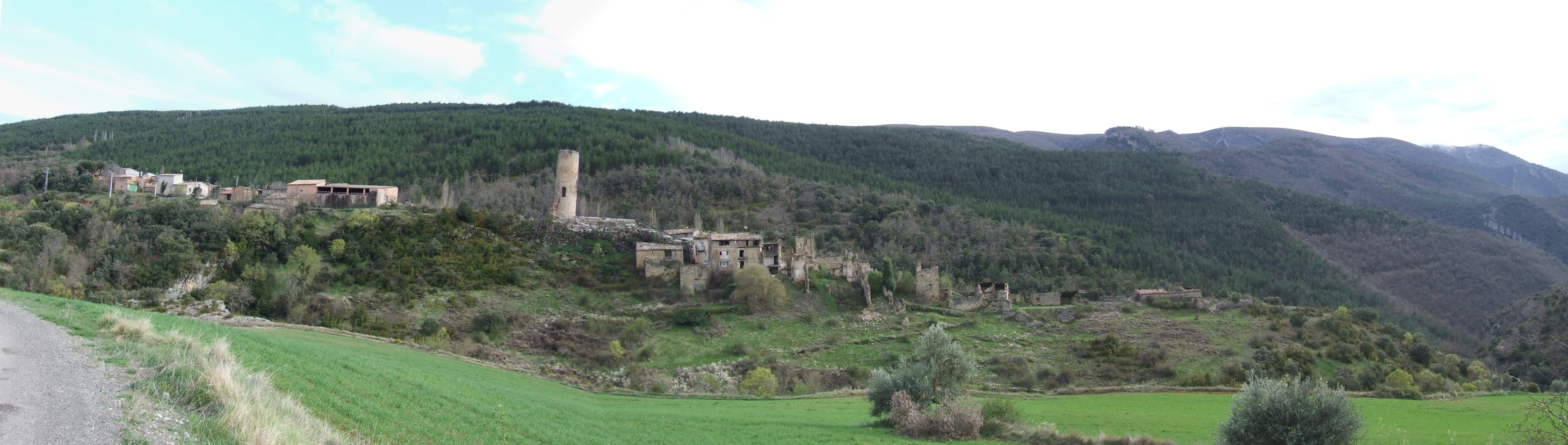 Panoràmica d'Alsamora (Sant Esteve de la Sarga, Pallars Jussà)